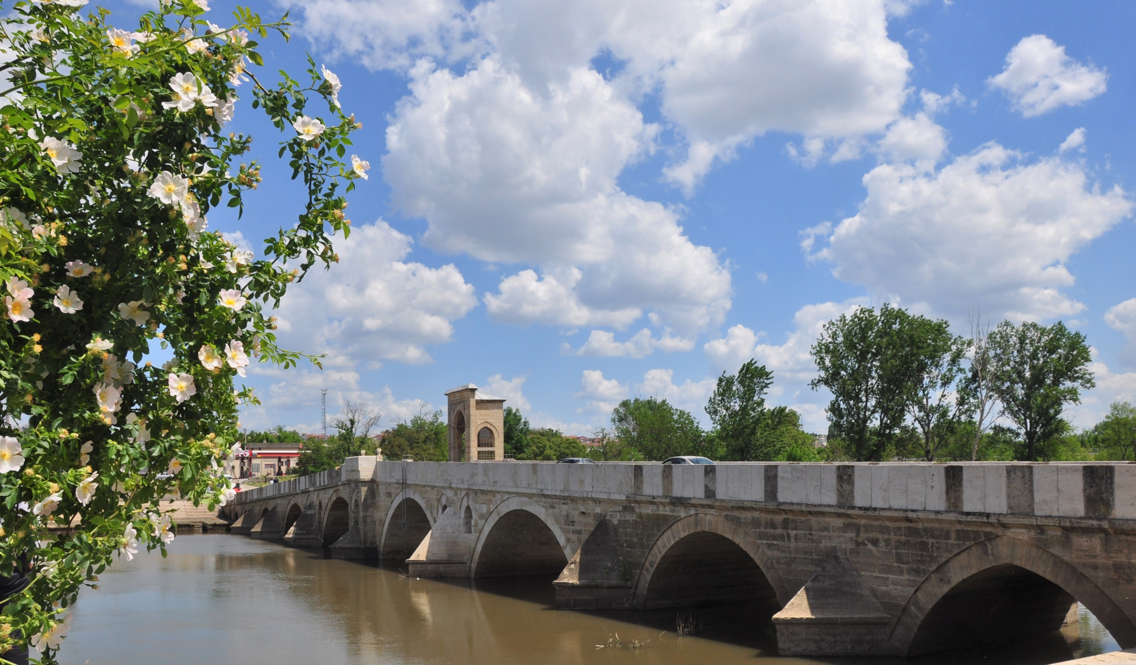 Edirne- Ekmekcioglu-Ahmed-Pascha-Brücke über die Tundscha (Tunca)